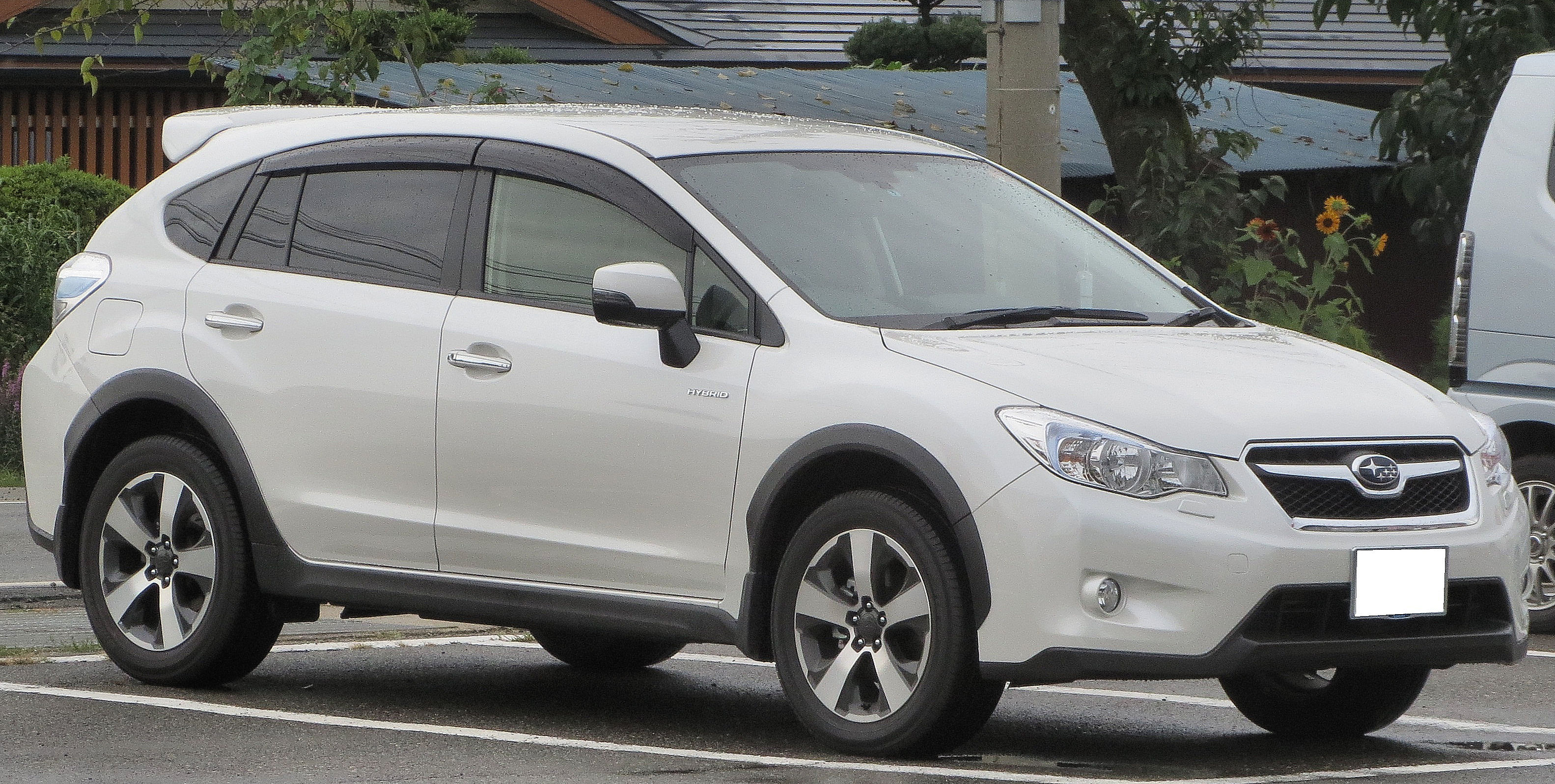 スバル XV ハイブリッド 2.0 i-L EyeSight